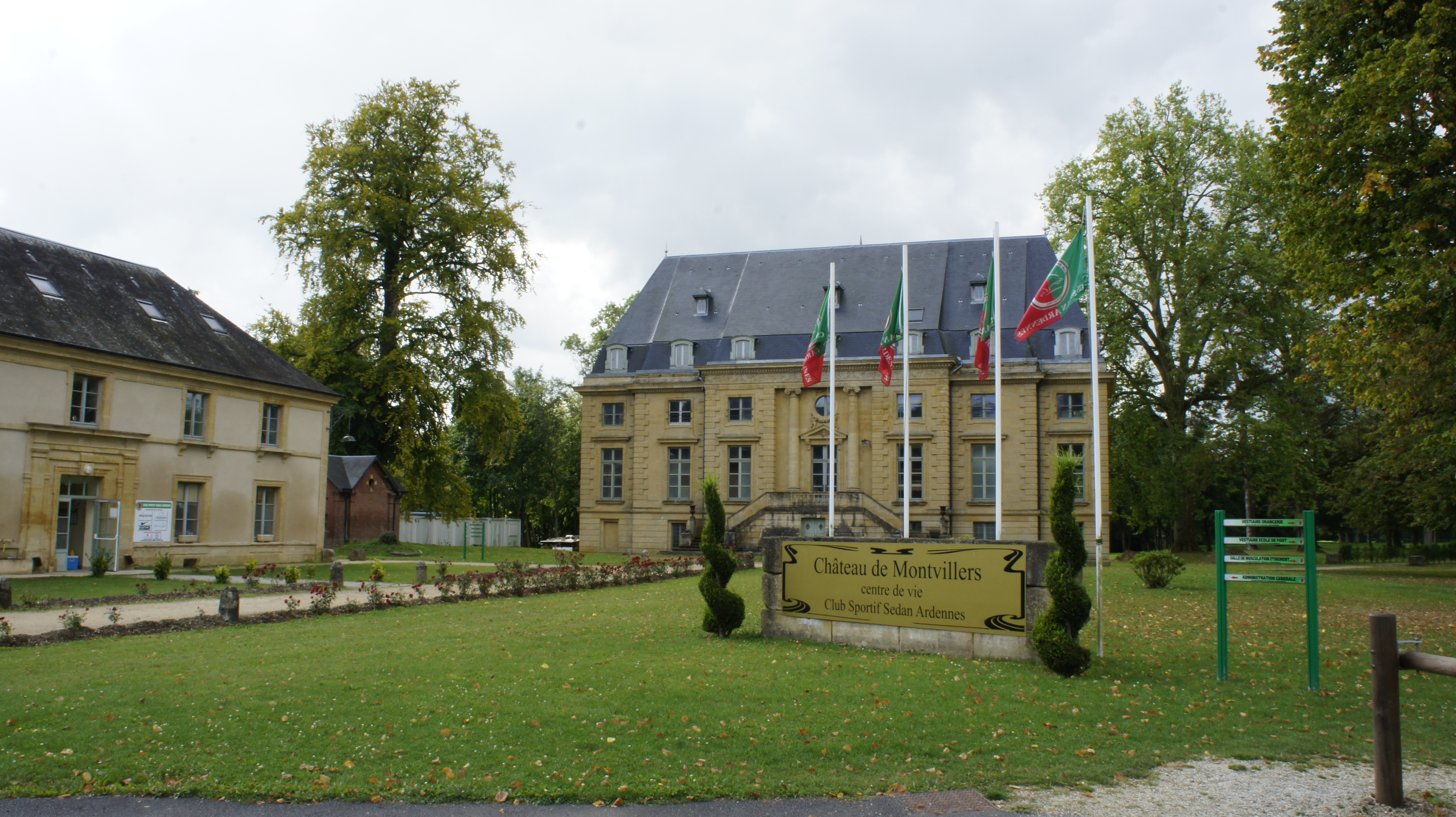 Complexe sportif d'entrainement du stade Sedan, parc du château.